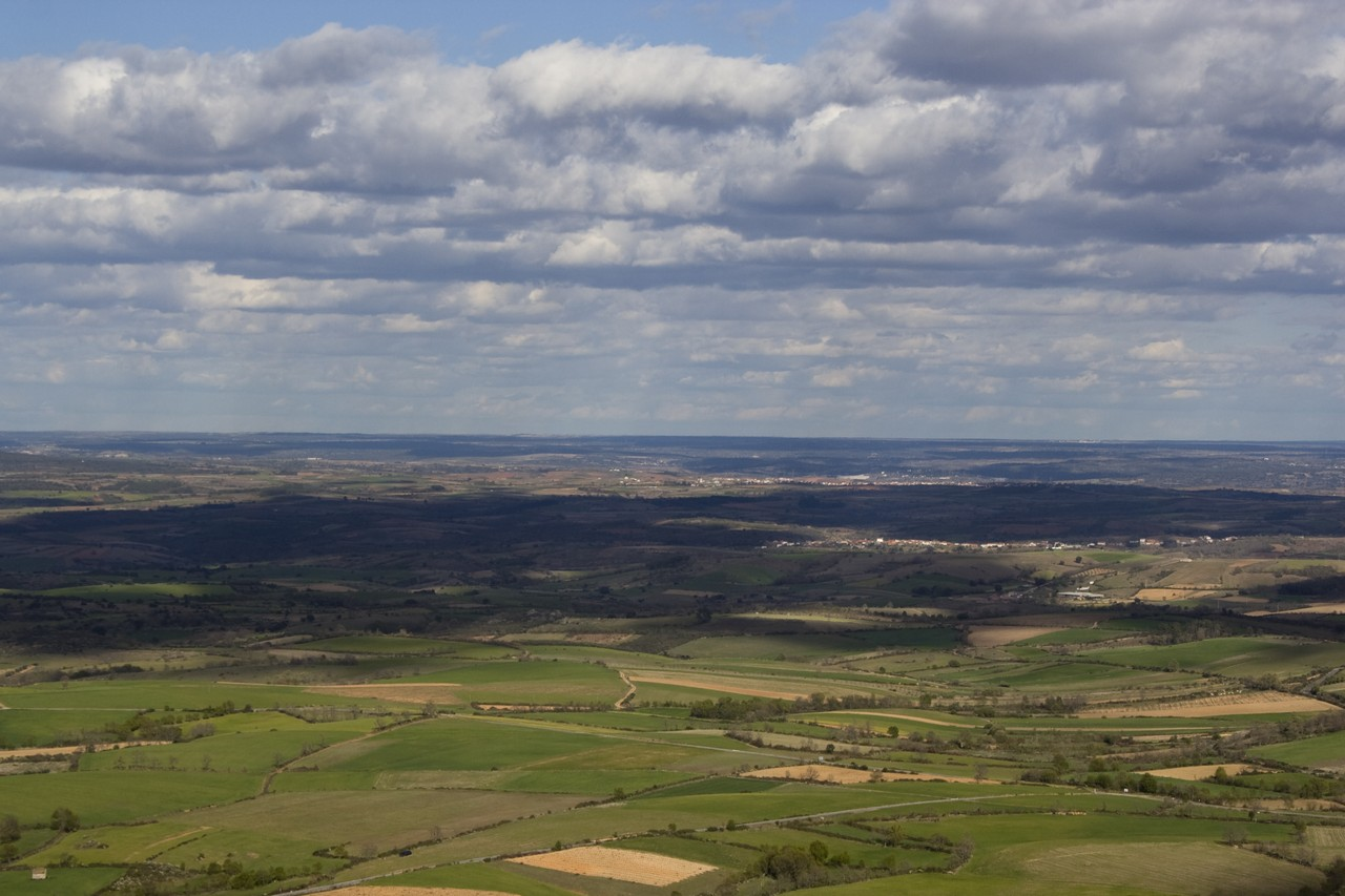 Vista desde a Serra de Mogadouro